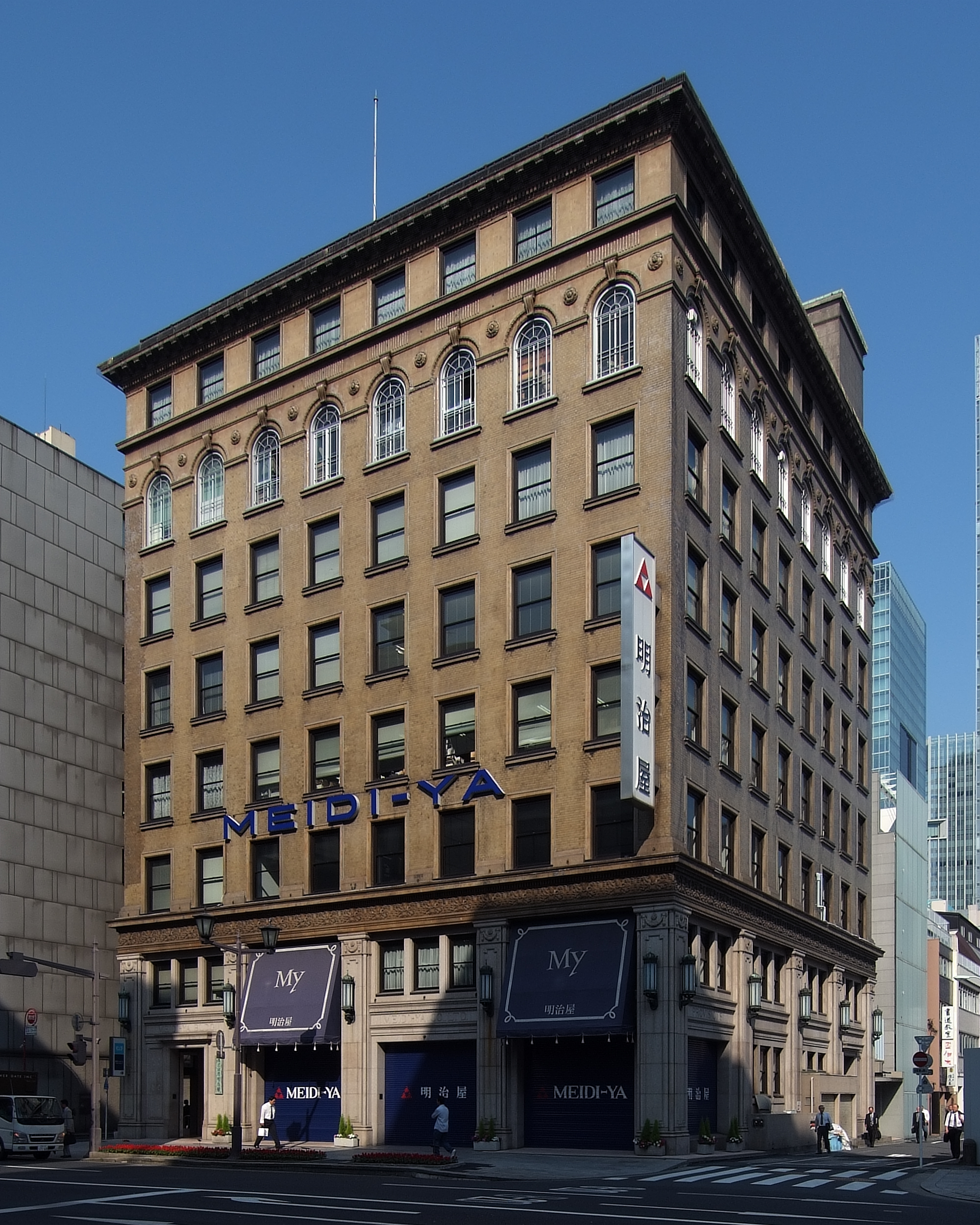 Meidiya Kyobashi Store, at Chuo-ku Tpkyo Japan.